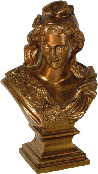 Grand format sur demande